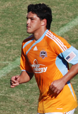 At home against LA